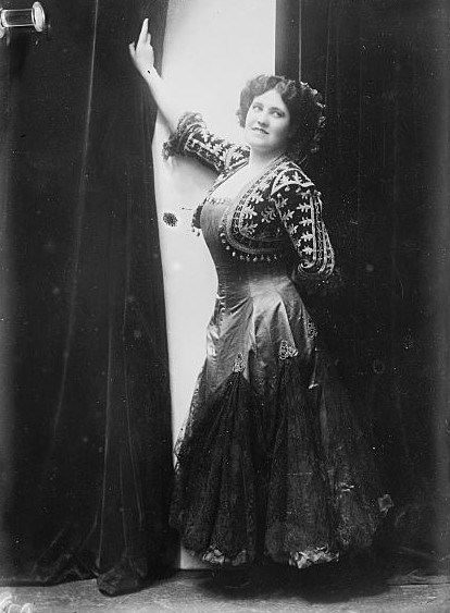 Lalla Miranda (1874-1944), Australian coloratura soprano